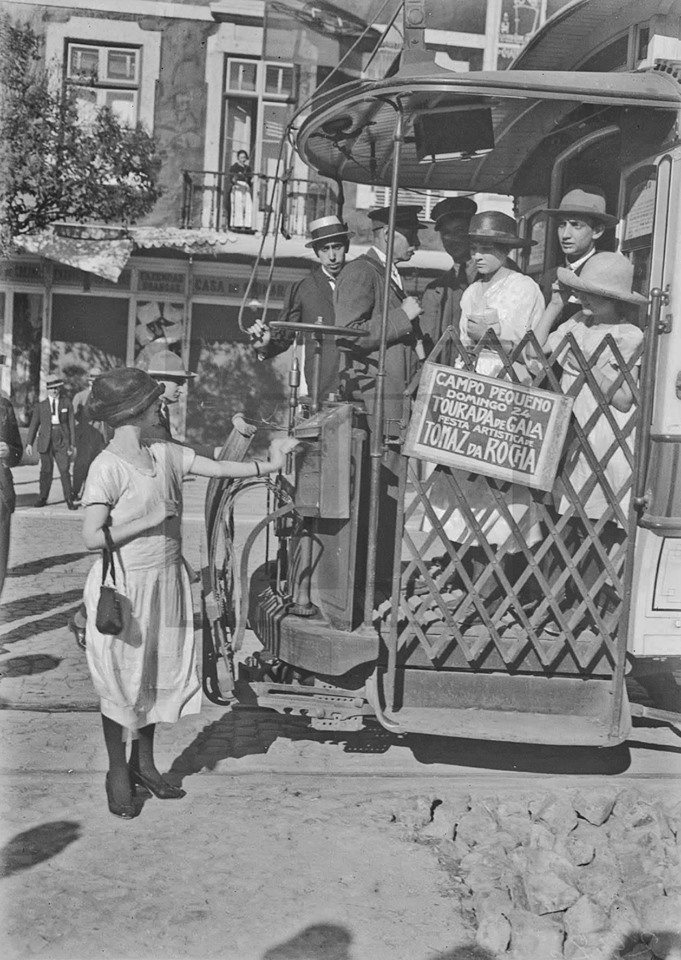 Bondes de Lisboa